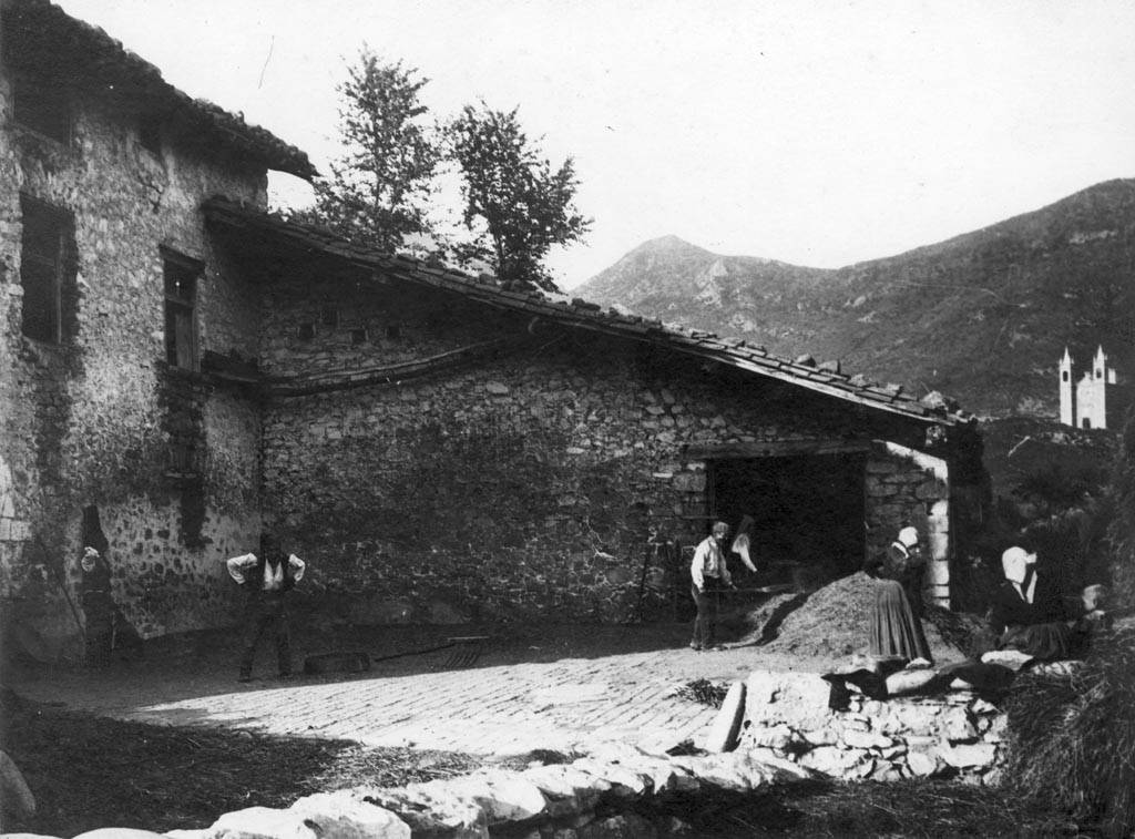 Gent treballant en una era de Creixenturri, al fons el Santuari del Remei de Camprodón. Cèsar August Torras i Ferreri (Entre 1890 i 1923)